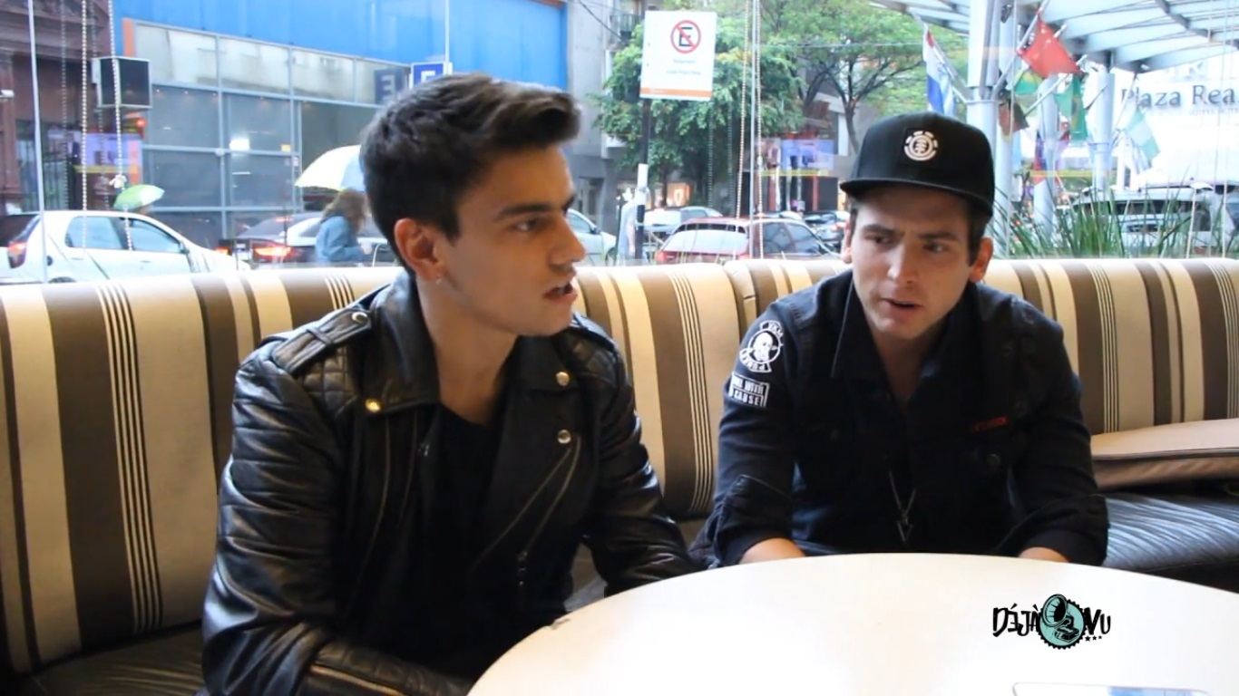 Maxi Espindola y Agus Bernasconi pasaron por Rosario presentando su nuevo tema "Fuego" juanto a Leslie Grace